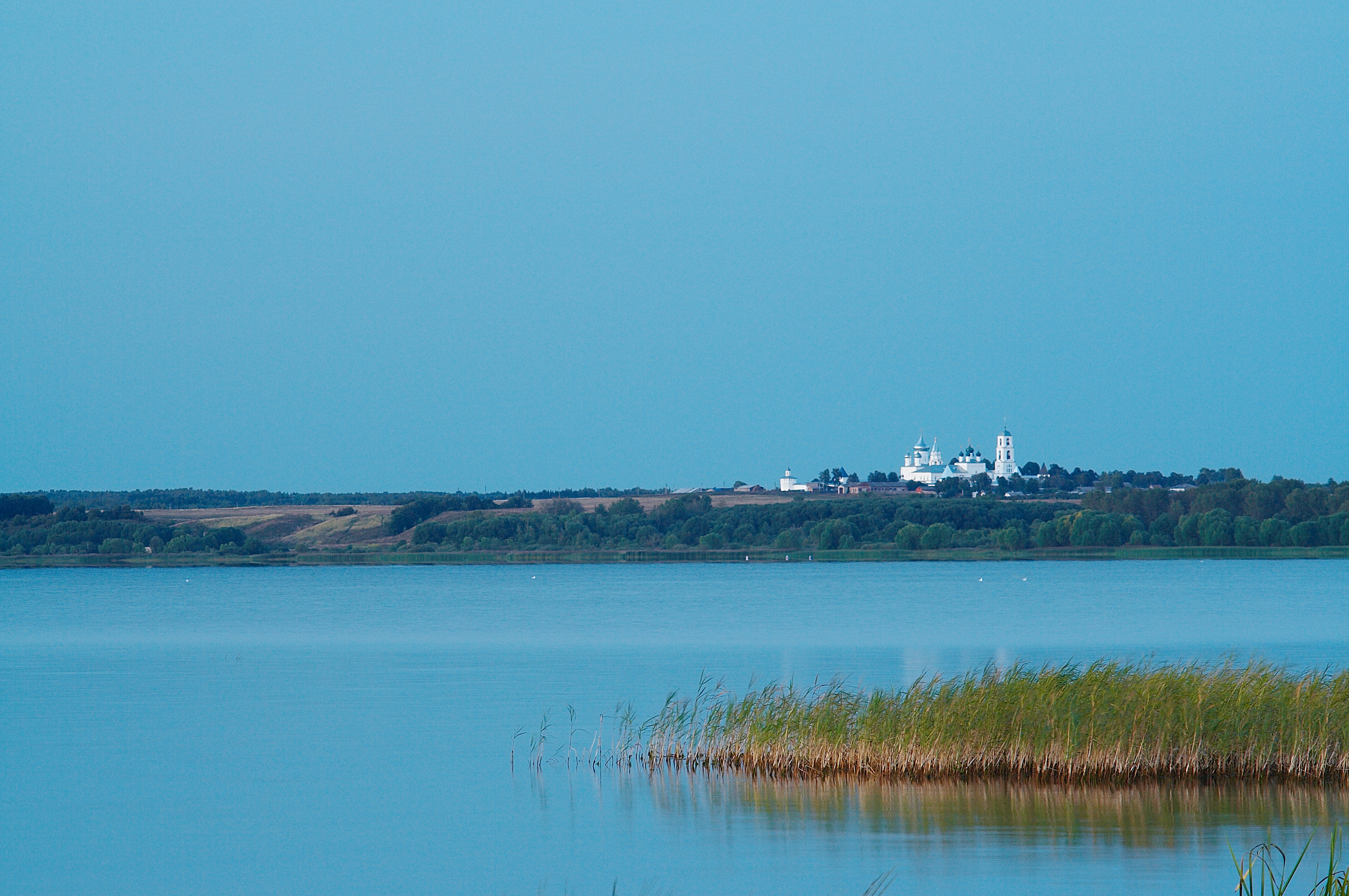 Плещеево озеро на закате Вид от Солдатского пляжа на Никитский монастырь. Город Переславль находится за правым краем фотографии.